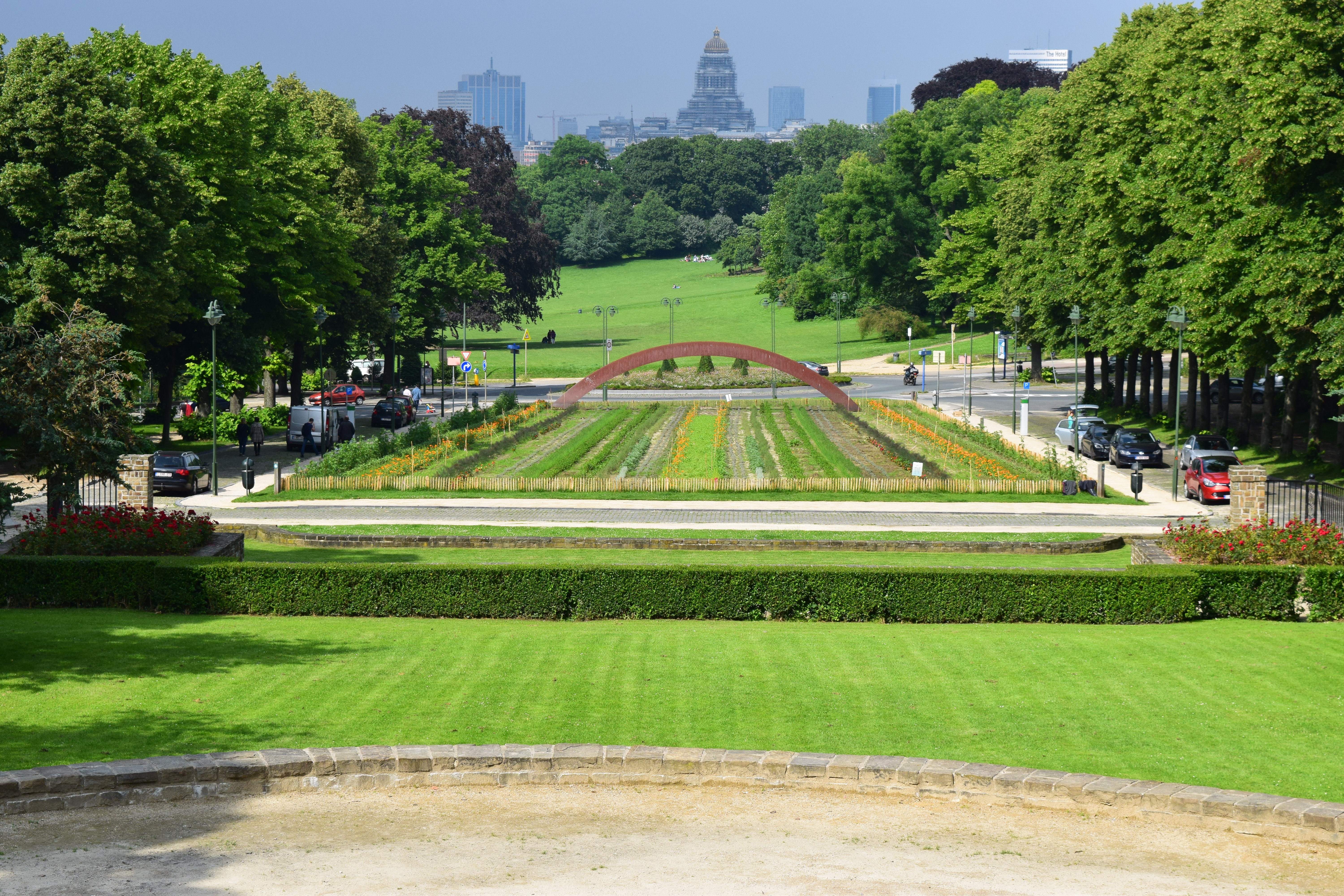 Uitzicht op de skyline van Brussel vanuit het Dudenpark in Vorst